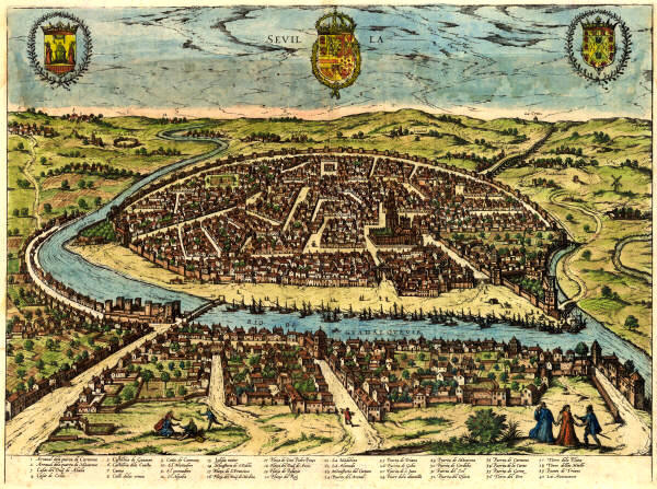 Grabado del siglo XVIII, que representa una vista de Sevilla, desde Triana.